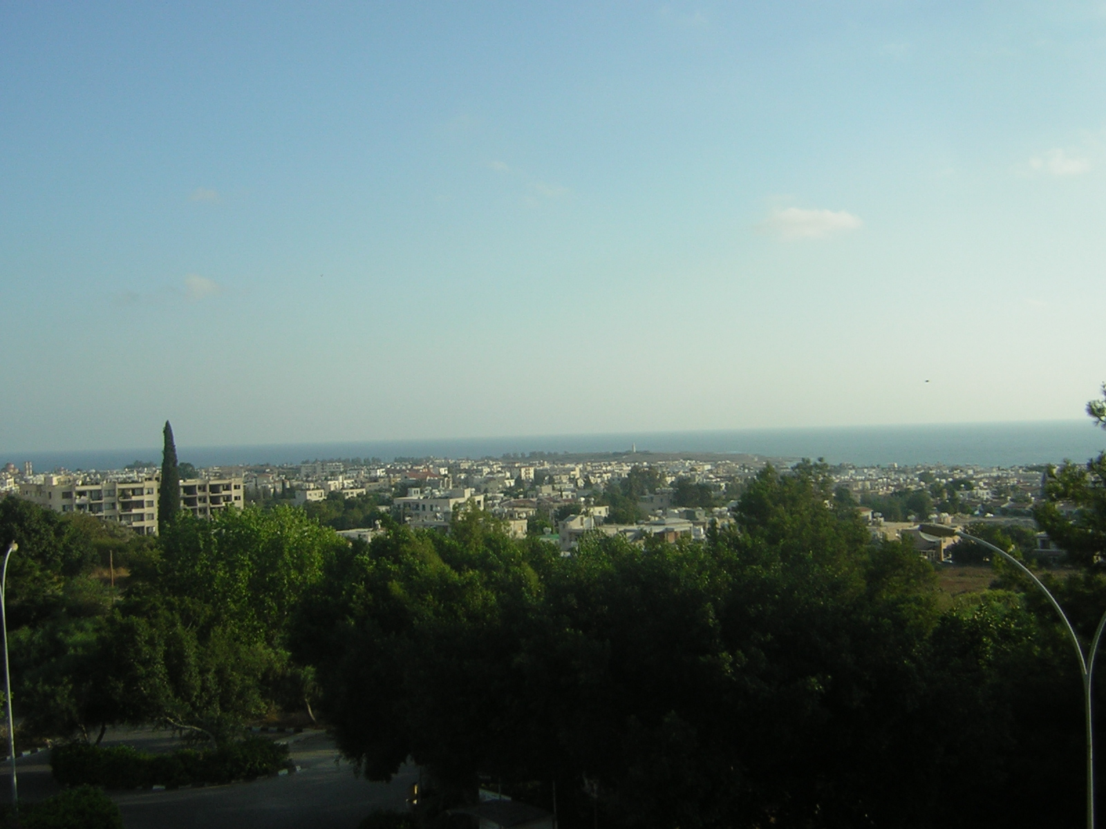 Paphos, Cyprus